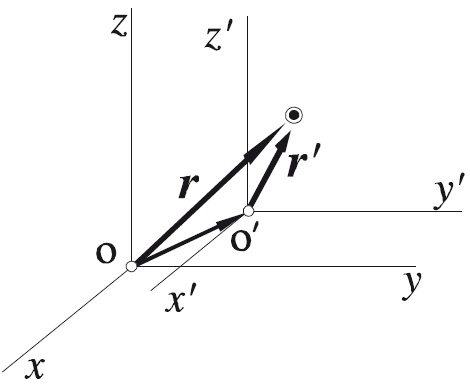 Vector de posición. Traslación del referencial.